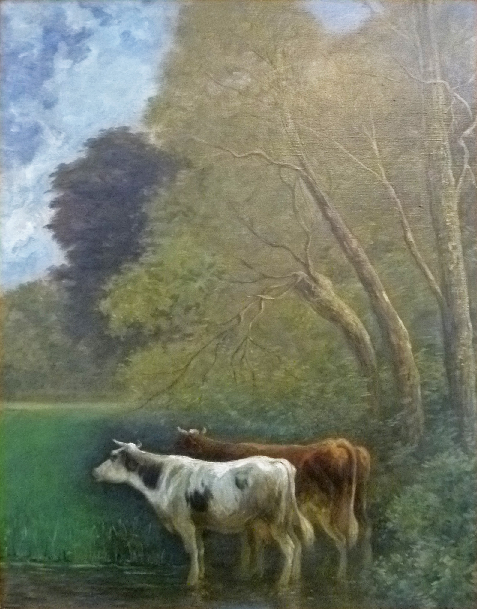 "Landschap met koeien", olieverf op doek (80 x 60 cm) door Rosa Venneman; privécollectie